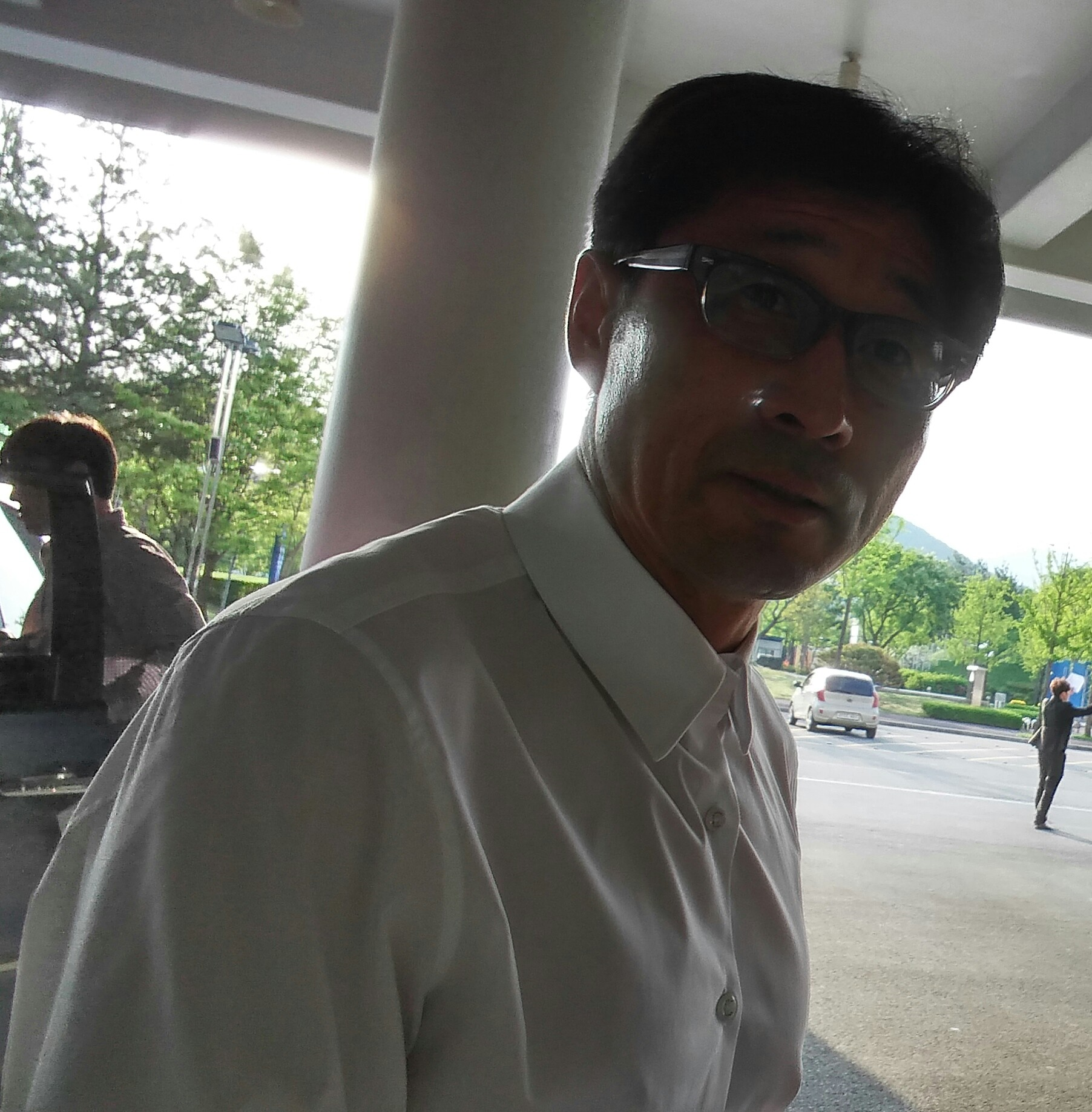 조덕제 감독